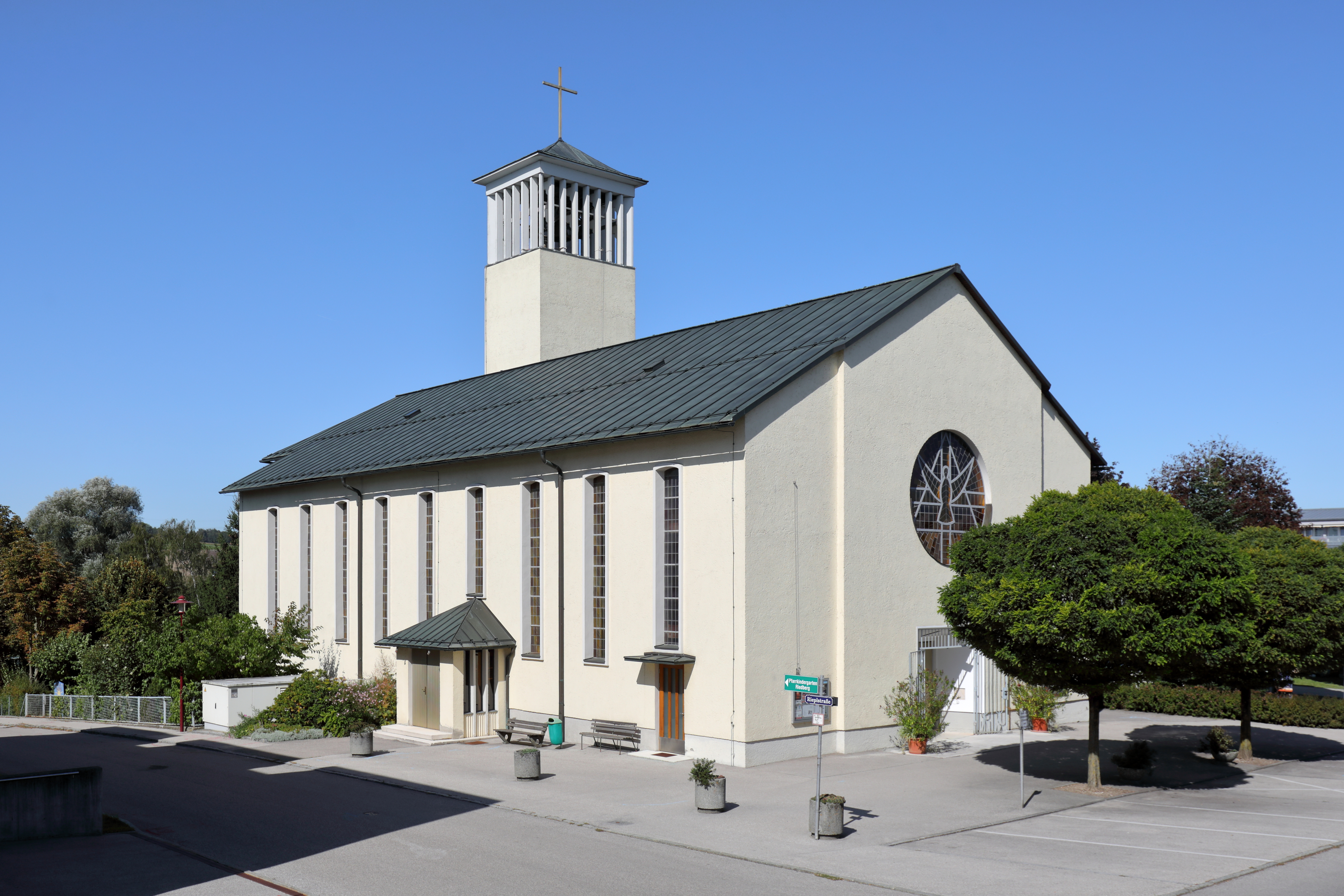 Südostansicht der röm.-kath. Pfarrkirche der Allerheiligsten Dreifaltigkeit in Riedberg, ein Ortsteil der oberösterreichischen Stadtgemeinde Ried im Innkreis.Die Kirche wurde ab 1955 (Grundsteinlegung am 6. November 1955 durch Diözesanbischof Franz Zauner) nach Plänen des Rieder Baumeisters Paul Fellner errichtet und am 29. September 1956 feierlich geweiht. Ursprünglich eine Filialkirche wurde das Riedberggebiet ab 1. Jänner 1964 zur Pfarrexpositur erhoben und mit allen Rechten und Pflichten einer selbständigen Pfarre ausgestattet.